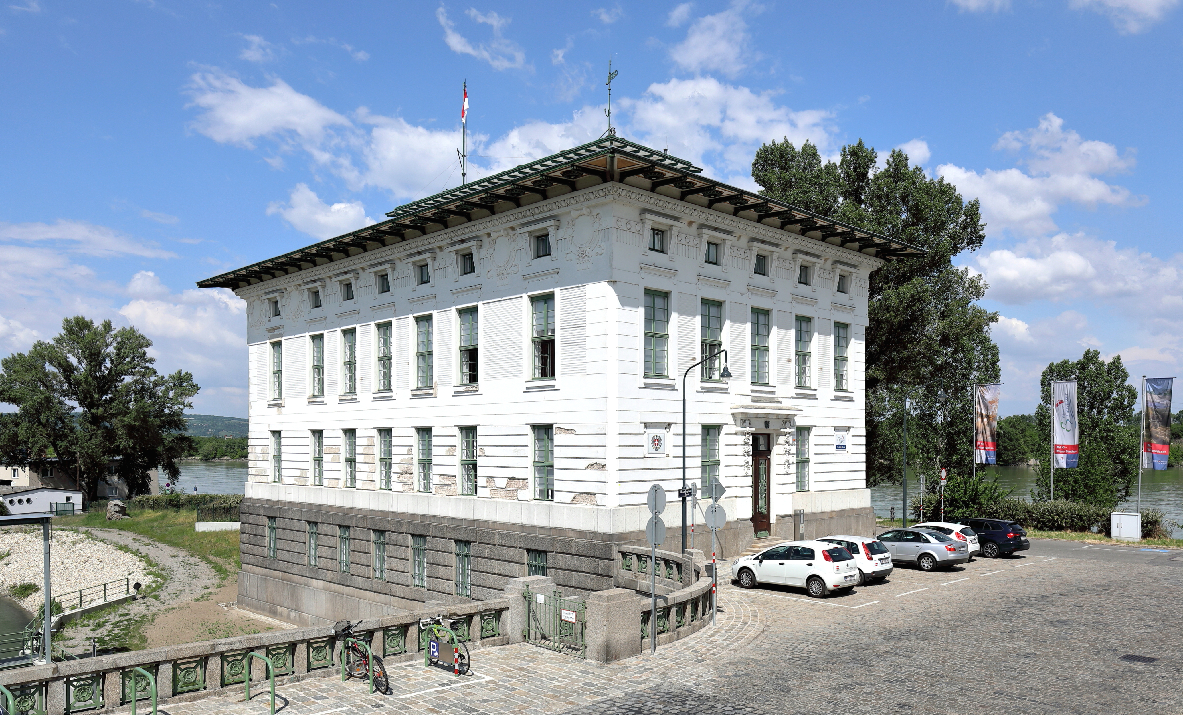 Das Verwaltungsgebäude bei der Nussdorfer Wehr- und Schleusenanlage im 20. Wiener Gemeindebezirk Brigittenau.Das Gebäude im secessionistischen Stil wurde nach Plänen von Otto Wagner für die „Donau-Regulierungs-Commission“ im Zuge des Baues der Nussdorfer Wehr- und Schleusenanlage in den 1890er Jahren errichtet. Aktuell (2018) dient das Gebäude als Zentrale der Magistratsabteilung 45 - Wiener Gewässer.